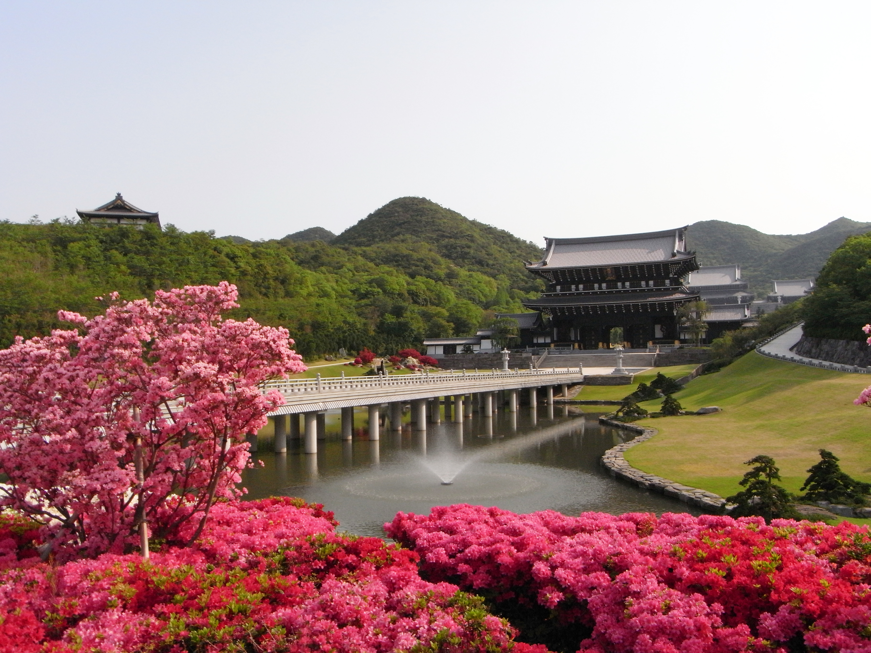 念仏宗(念佛宗)無量寿寺「佛教之王堂」ツツジと山門と真如橋